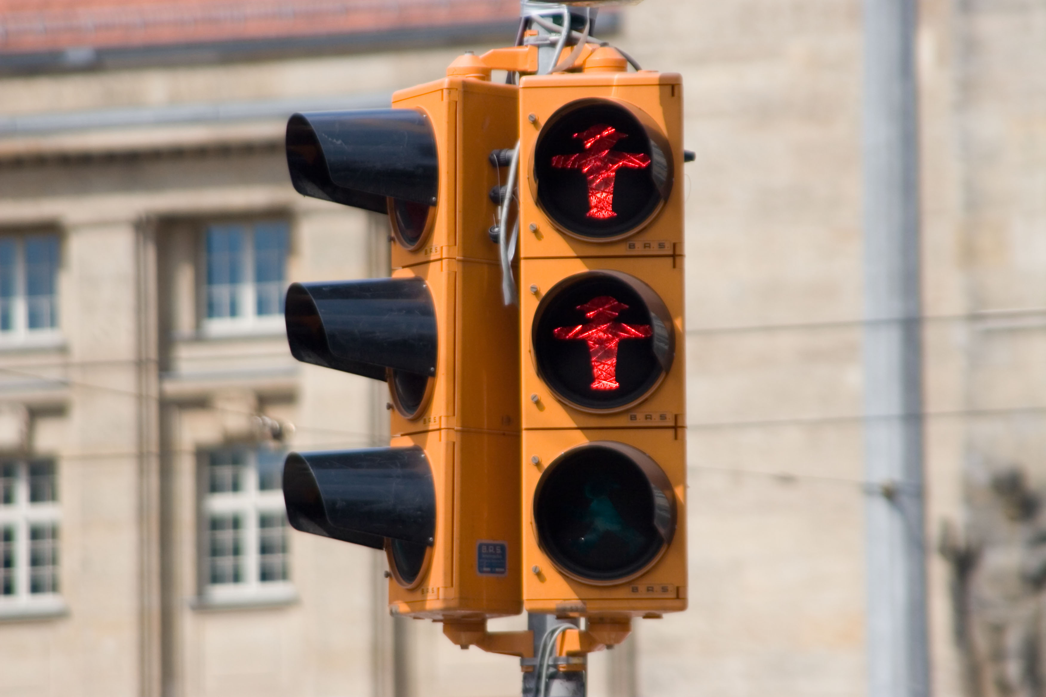 Hauptbahnhof Leipzig